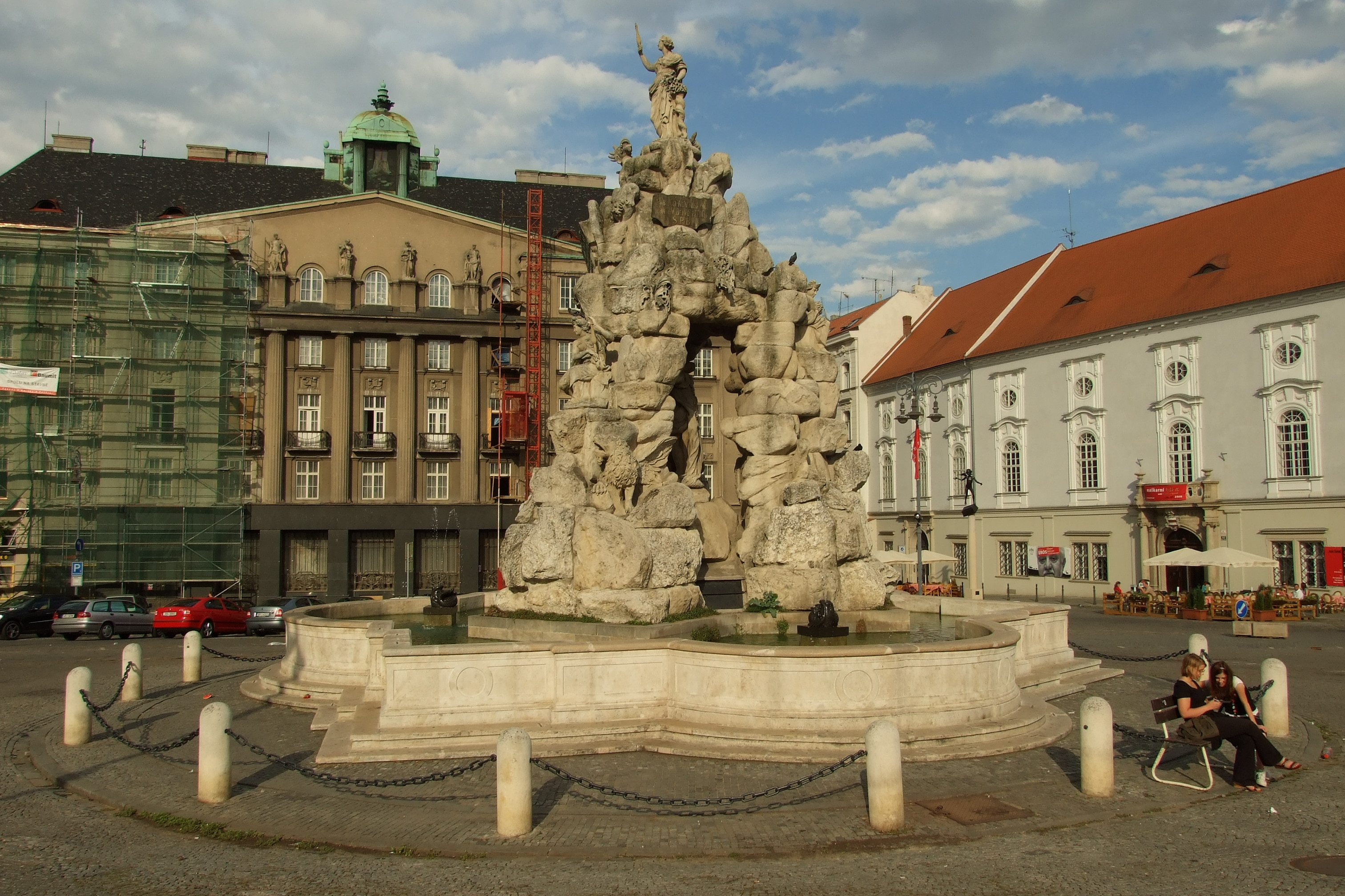 Kašna Parnas v Brně na Zelném trhu, vyfotografovaná od západu